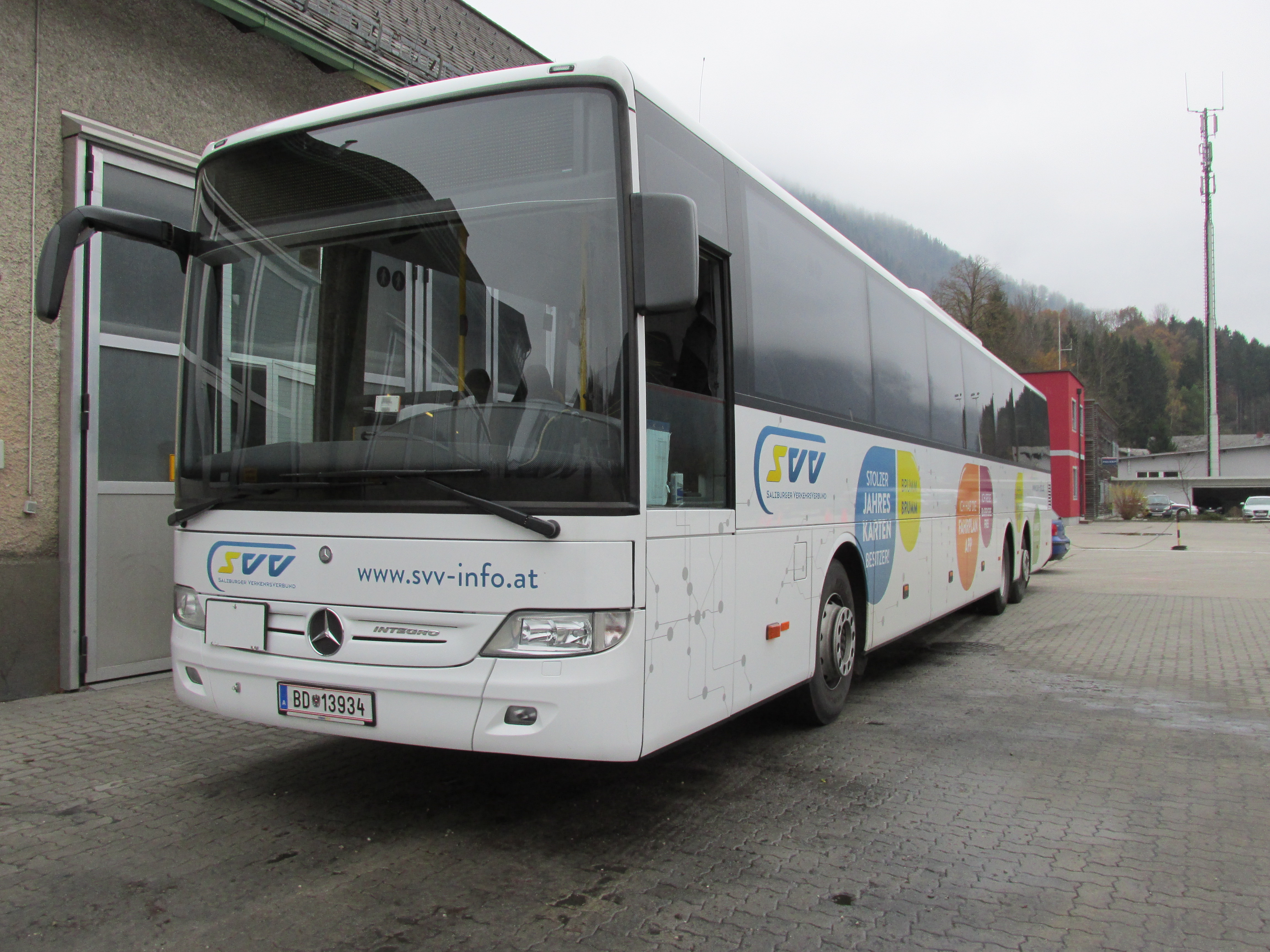 Einer der beiden beklebten SVV Werbebusse der ÖBB-Postbus GmbH hier in Bad Ischl